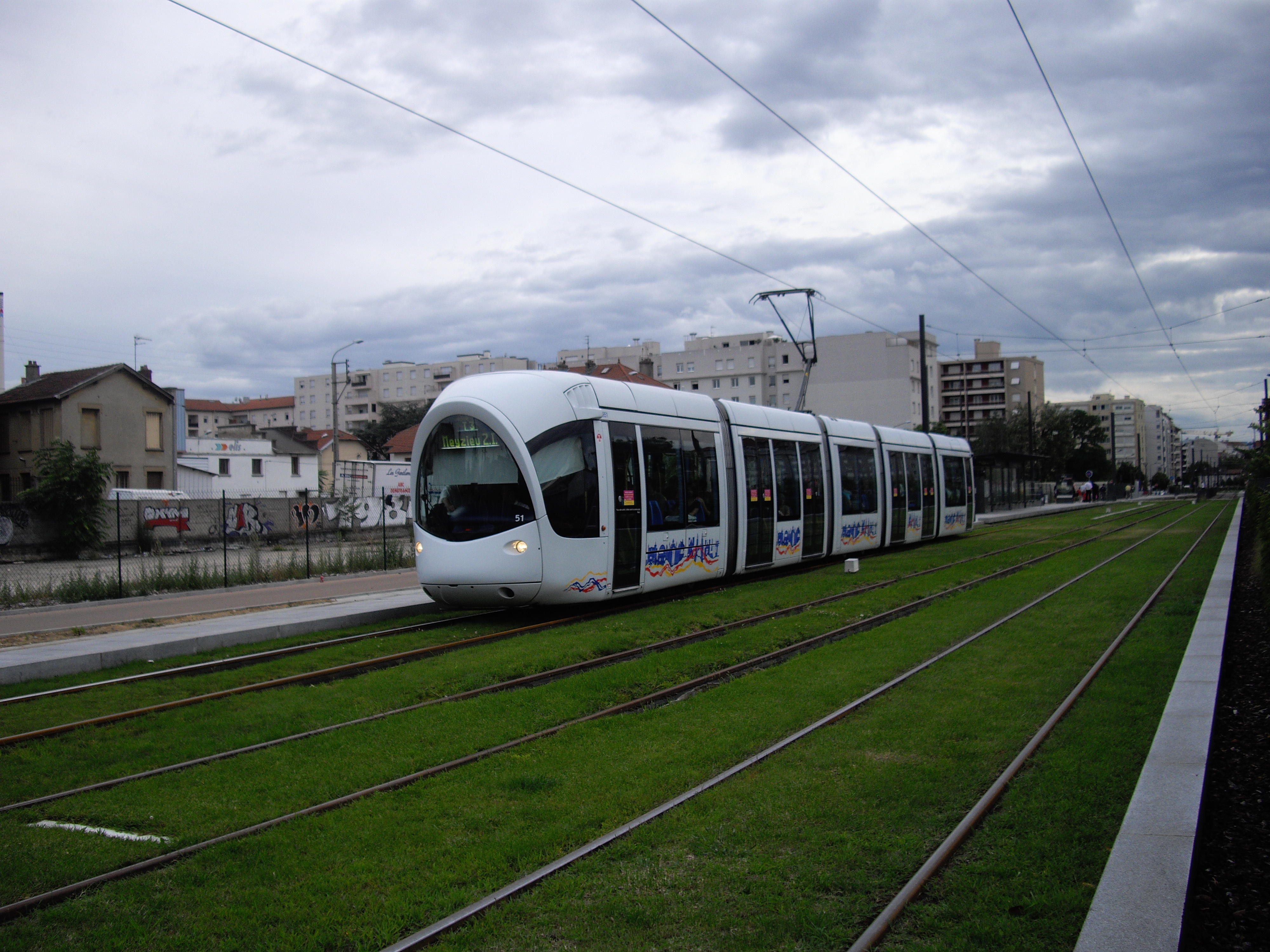 Alstom Citadis 302 - Tramway de Lyon - Ligne T3 - Station Gare de Villeurbanne, direction Meyzieu Z.I.